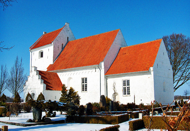 fra sydøst